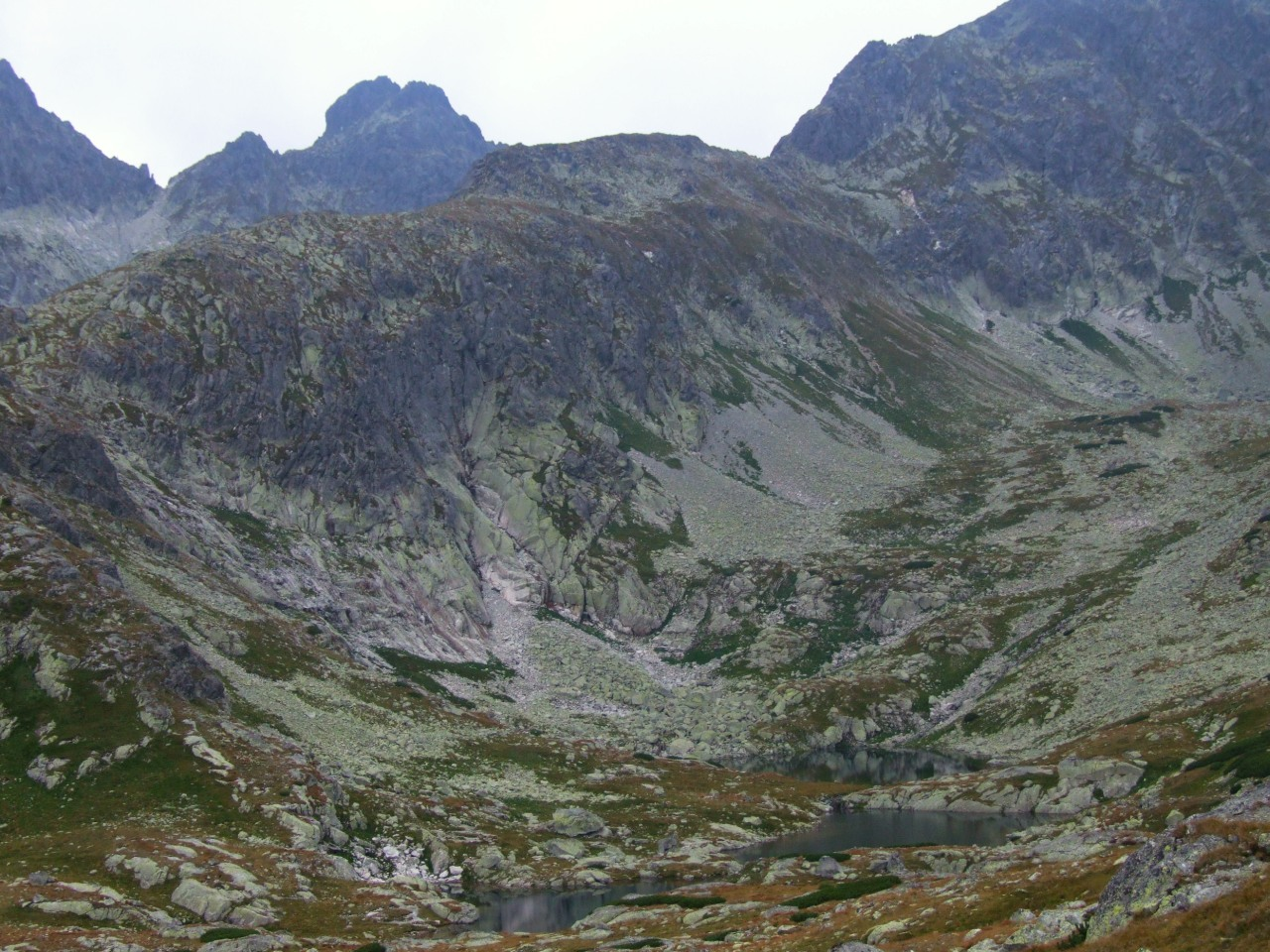 Zbójnickie Stawy w Dolinie Staroleśnej (słowackie Tatry Wysokie)